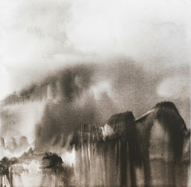 ללא כותרת, 2010, אקריליק על קנווס 110x110 סמ